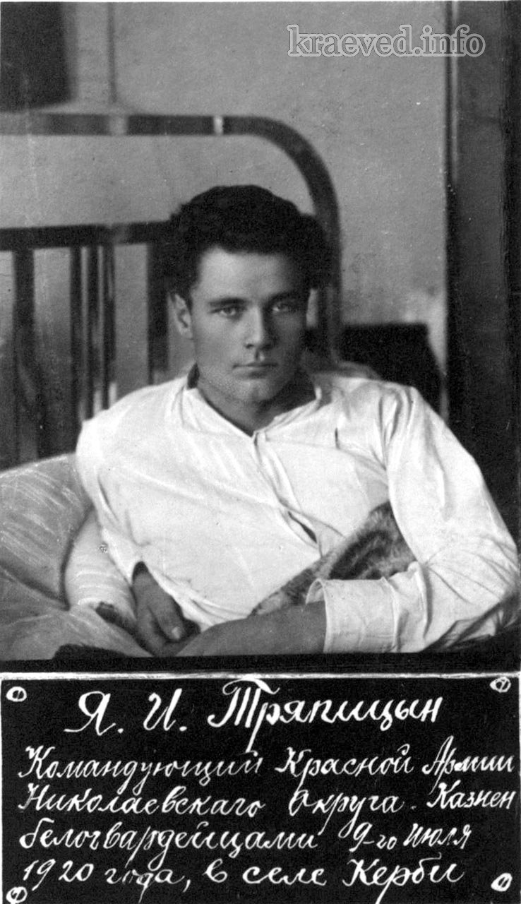 Яков Иванович Тряпицын - командующий Николаевским округом (фронтом) Красной Армии.